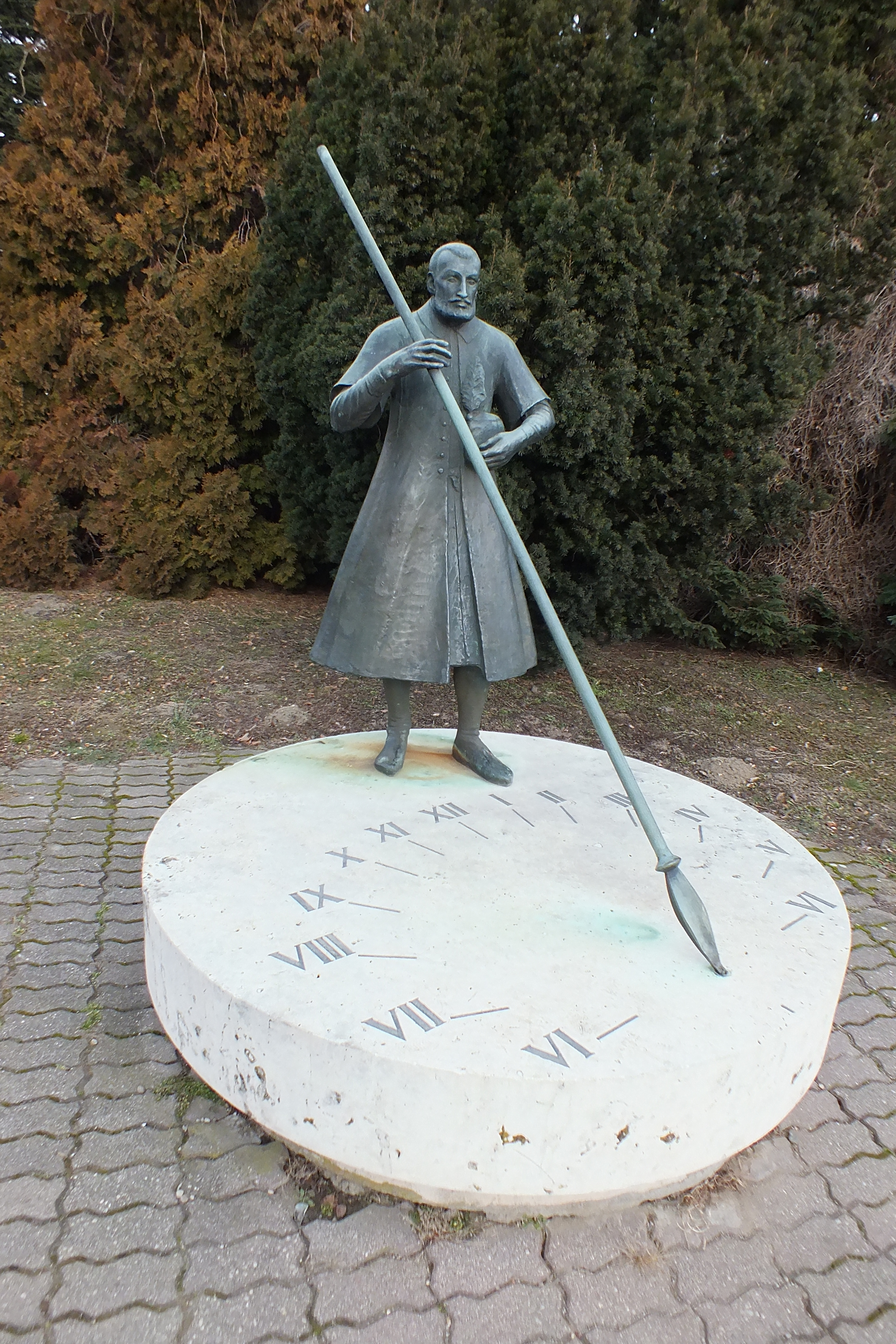 Nádasdy Ferenc, a fekete bég (Felállítás 1985, Körösényi Tamás) Vas megye, Sárvár, Rákóczi Ferenc u. 1., A Danubius Thermál Hotel előtt